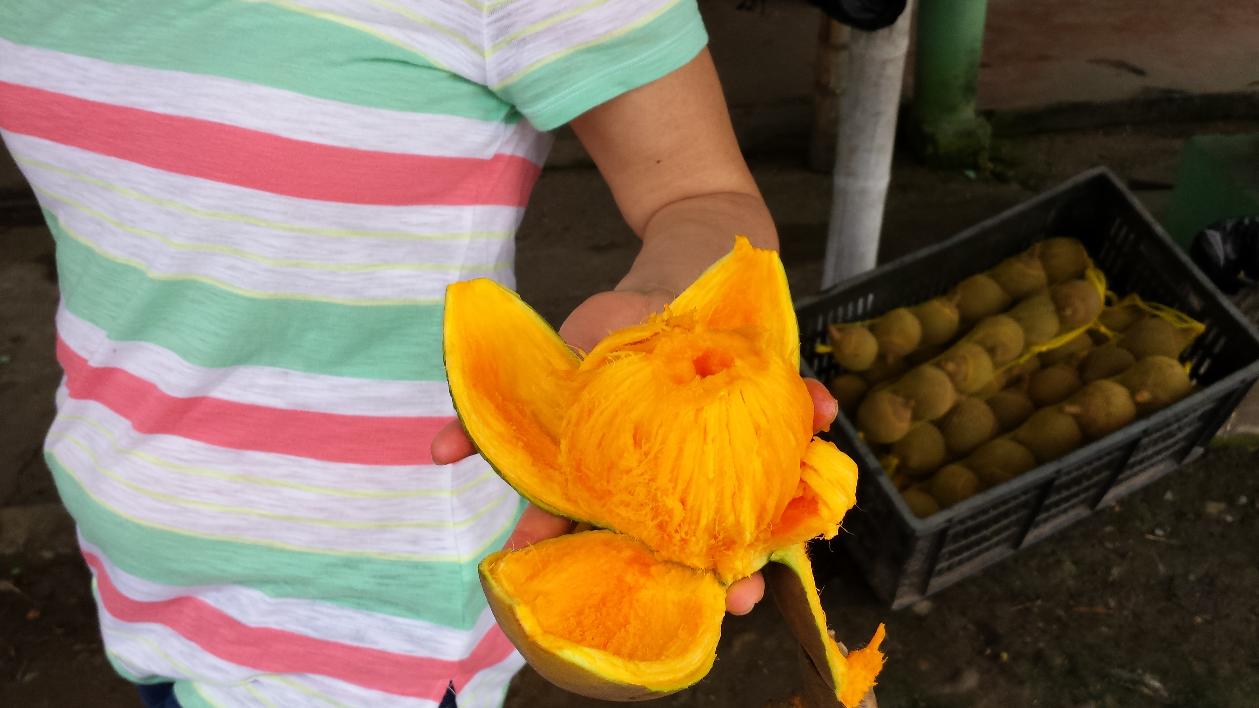 Un zapote (Matisia cordata) abierto, Meta, Colombia.